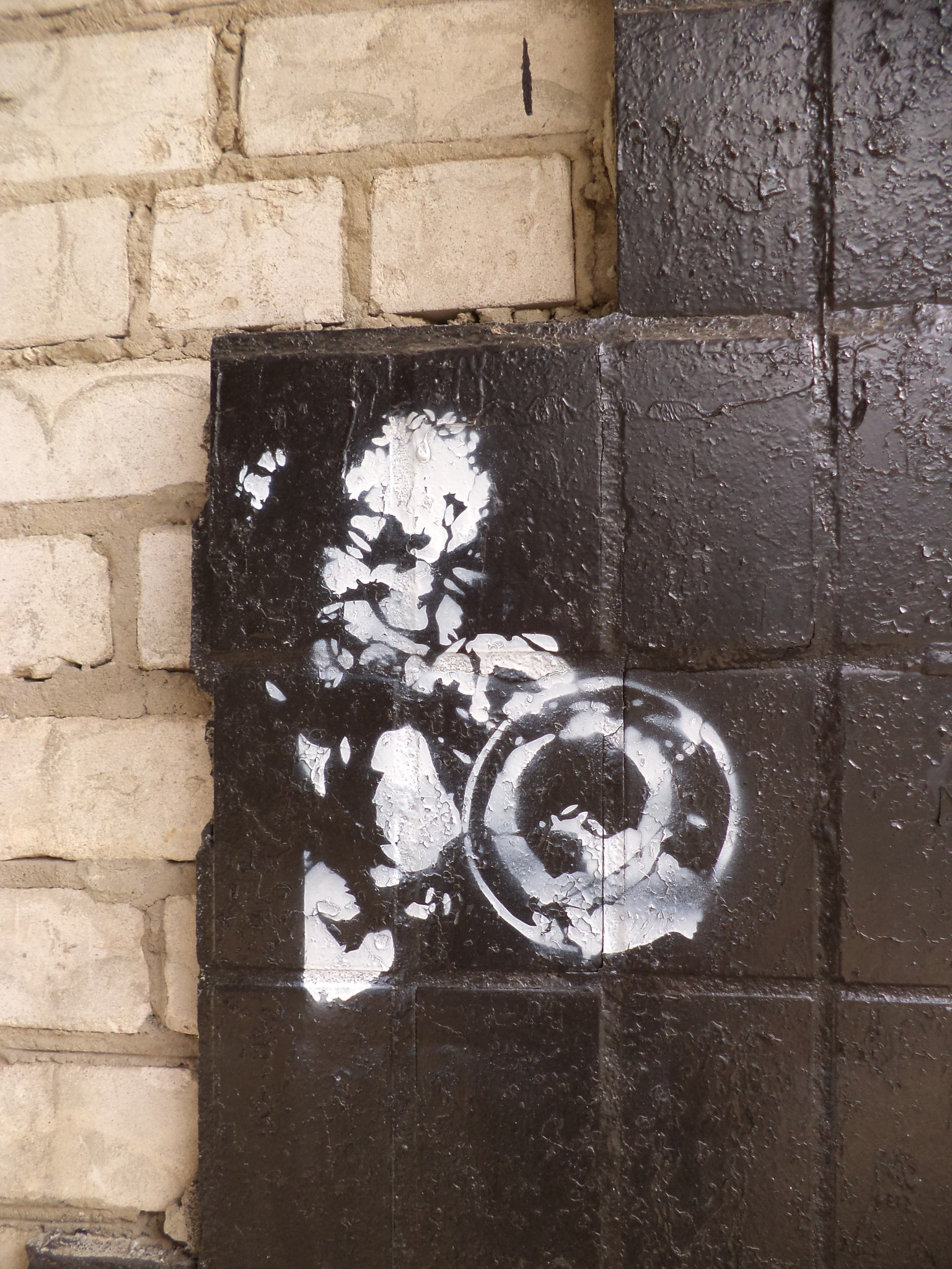 Трафарет